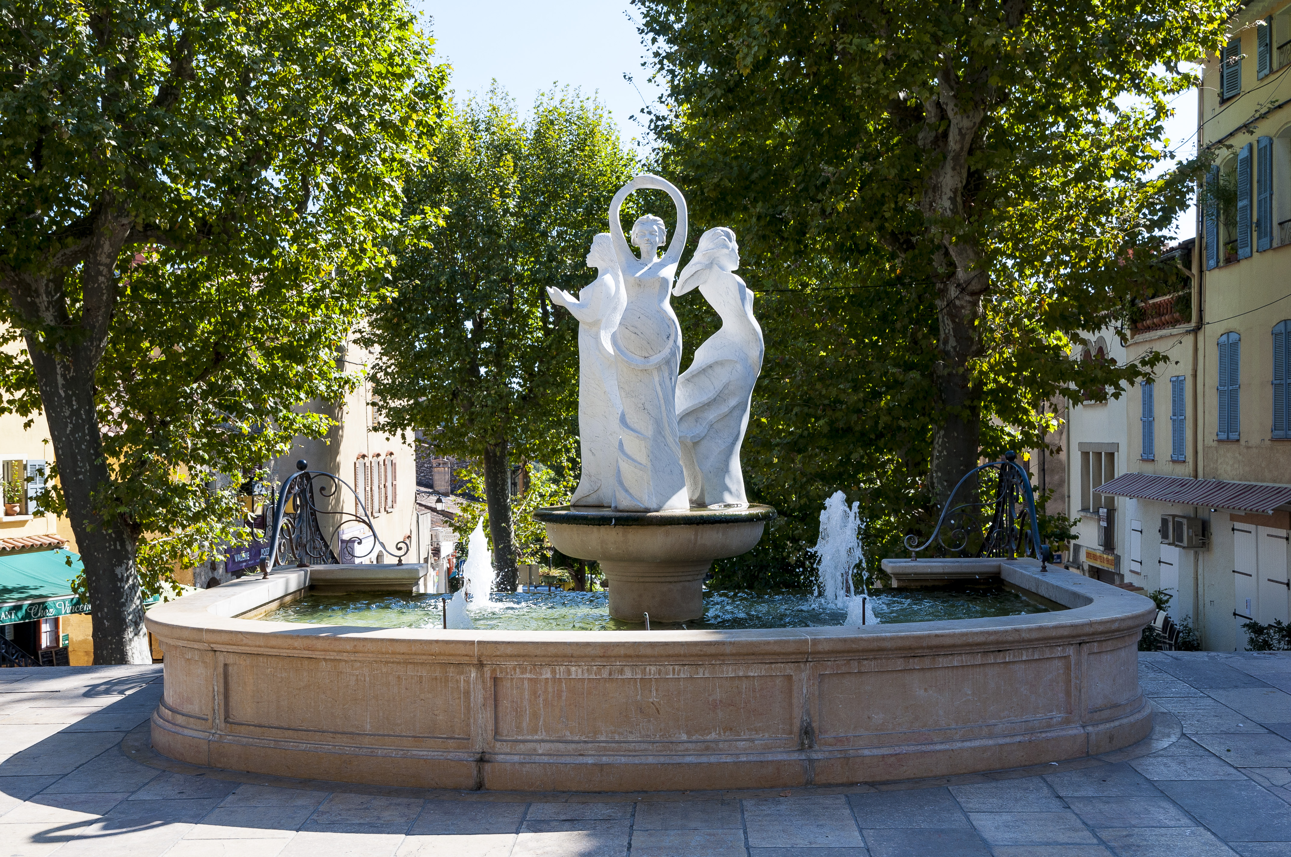 Lorgues petite ville provencale possède une fontaine.